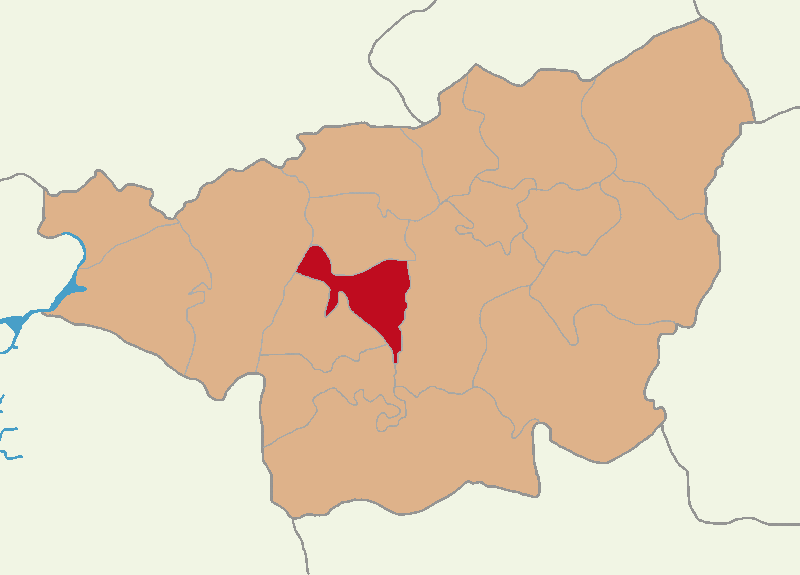 Yenişehir ilçesinin konumu